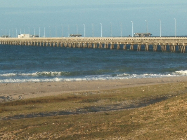 Praia do Pecém